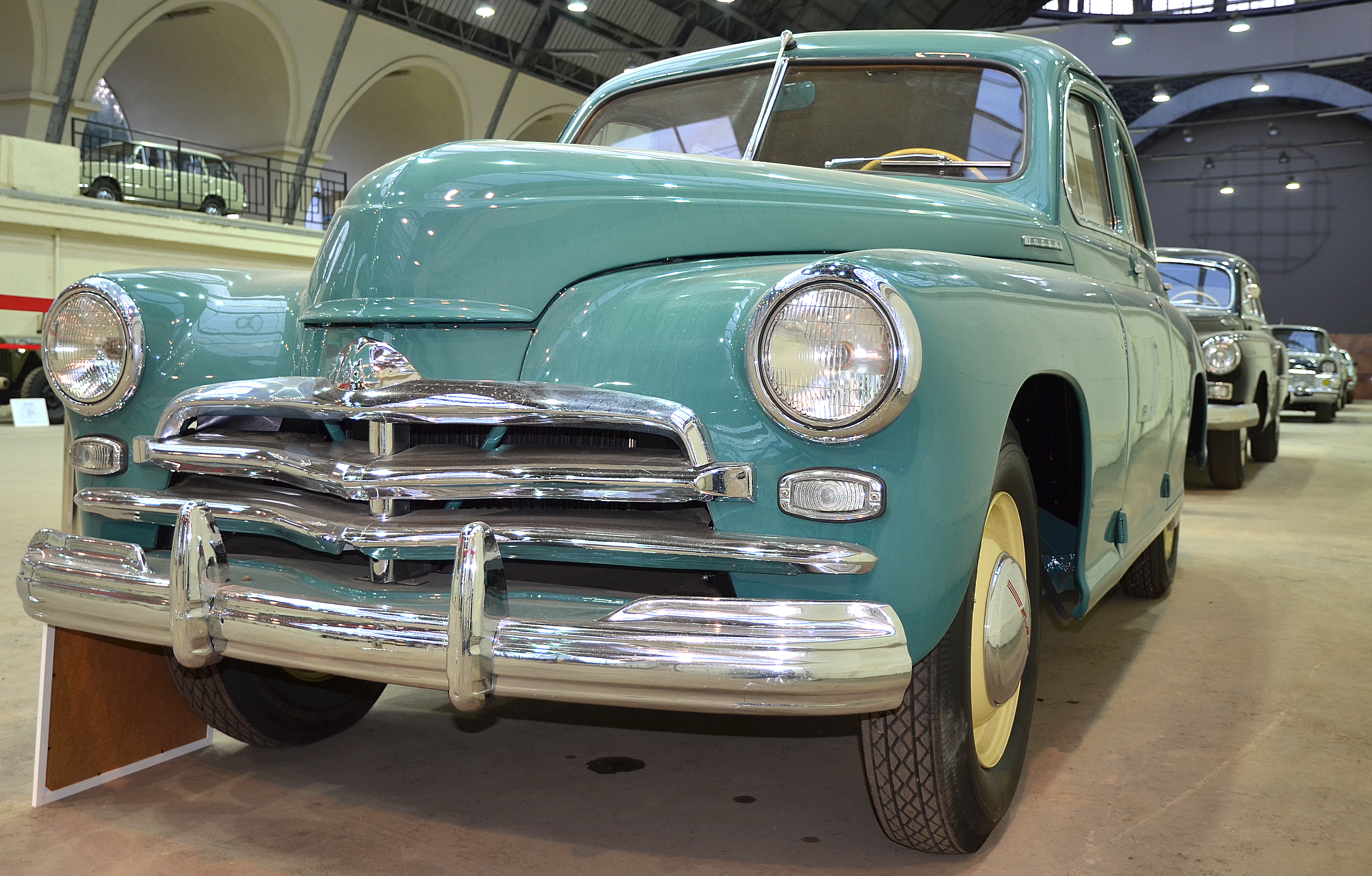 Можно увидеть здесь : You can see here